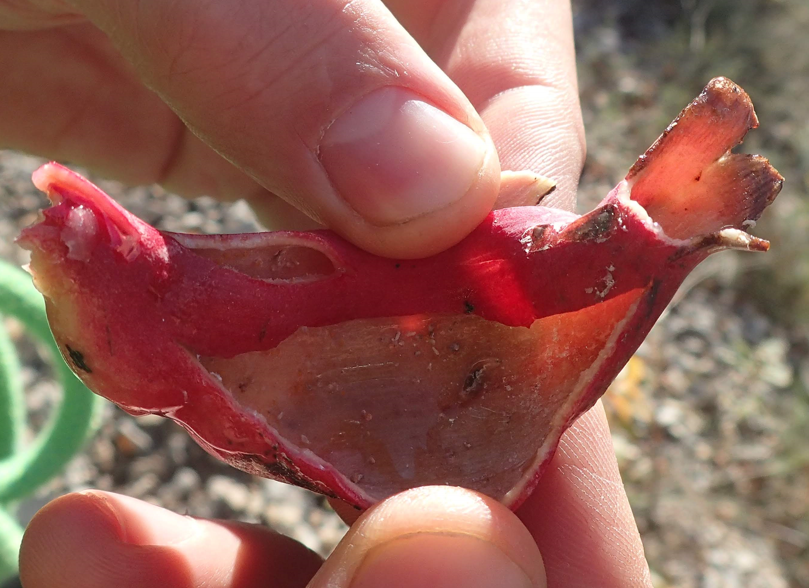 Cette galle a été ouverte transversalement, on observe à l'intérieur les amas de points blancs qui correspondent aux aphides.